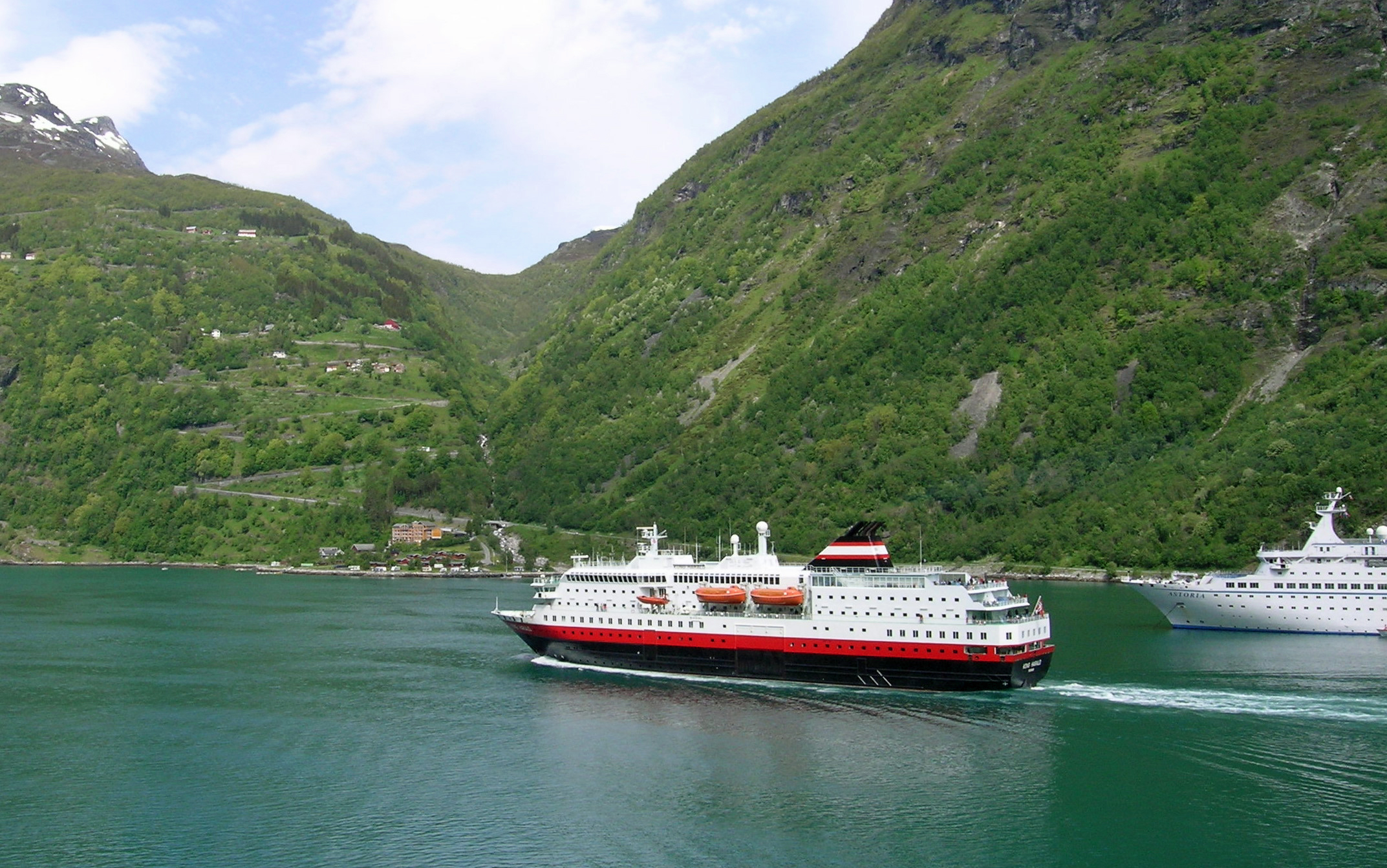 Kong Harald (Hurtigrute) und Astoria im Geirangerfjord vor der Adlerstraße